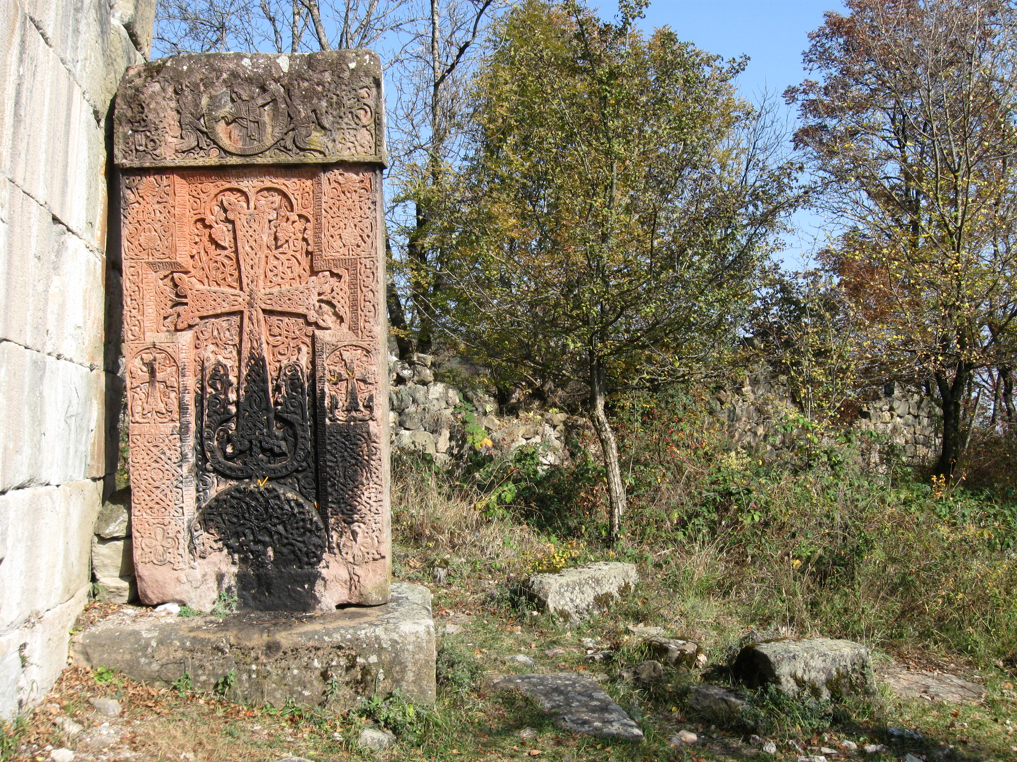 Խաչքար Առաքելոցի բակում